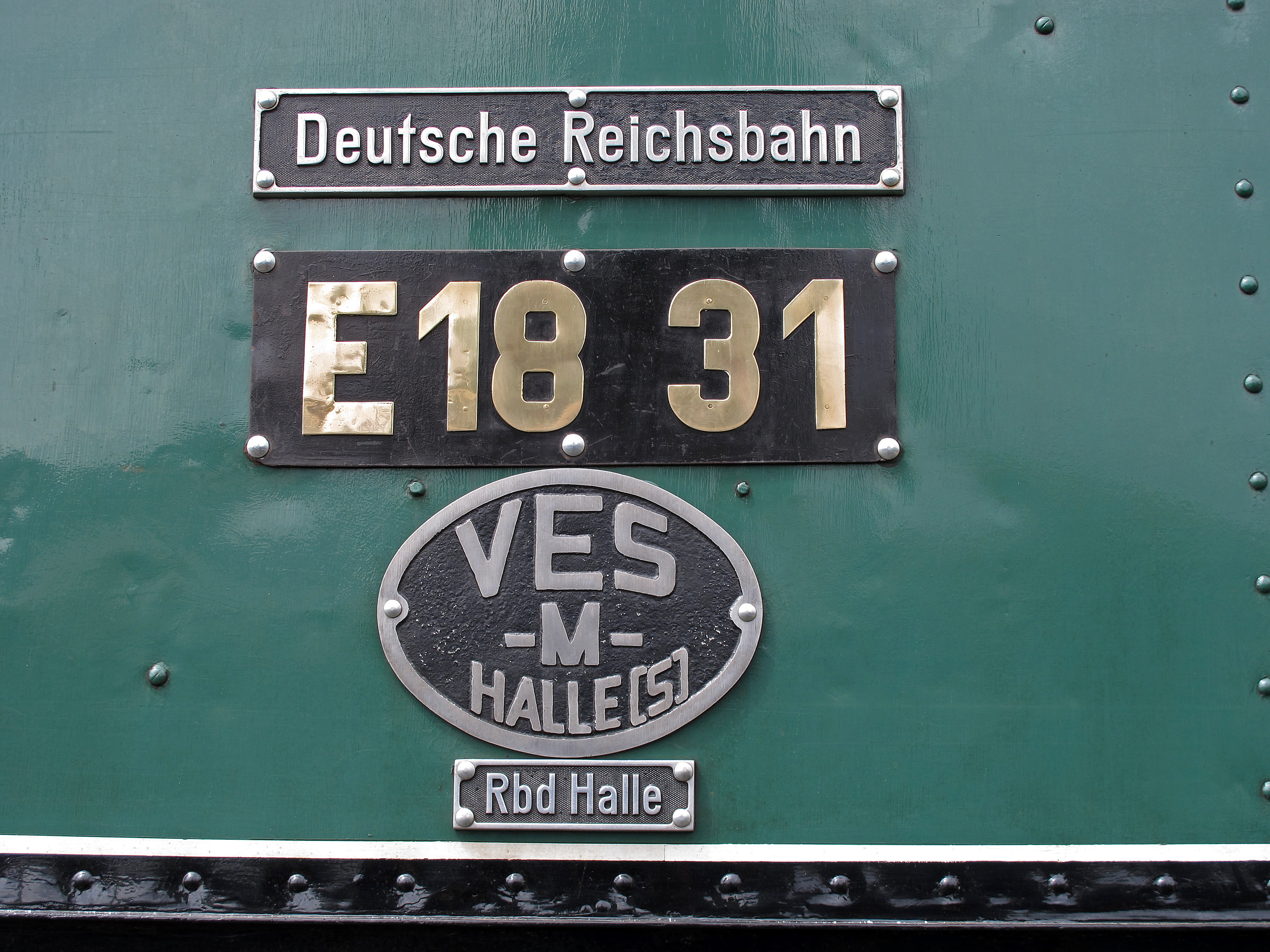 Lokschilder E 18 31, der früheren VES-M Halle